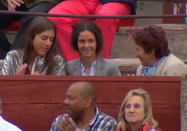 Victoria Federica de Marichalar y de Borbón le 29 juin 2017 recevant le brindis du torero Michelito dans les arènes de Ségovie. Les toreros Sébastien Castella, Alberto López Simón et Michelito estoquaient des taureaux de l'élevage de Loreto Charro.